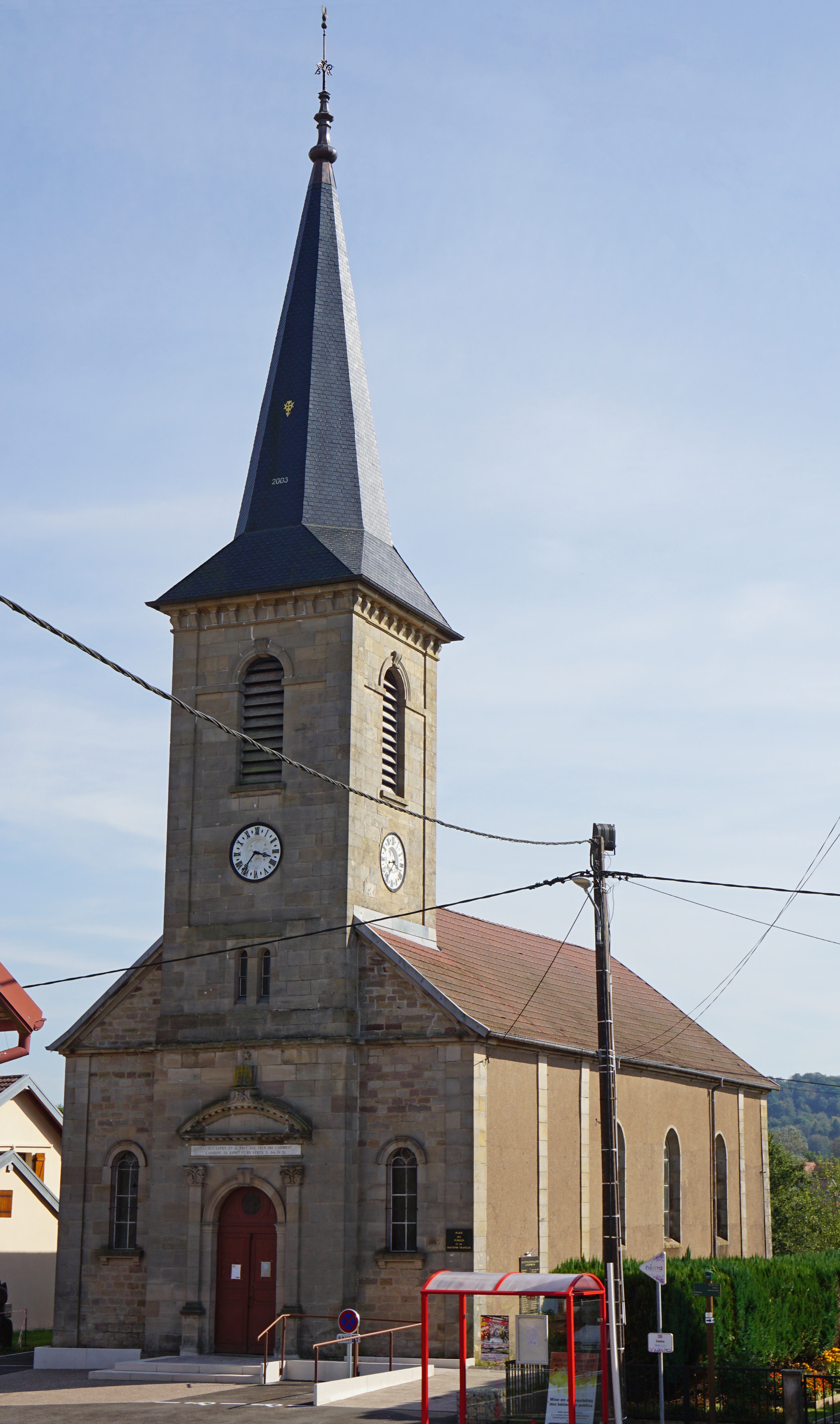 Temple protestant de Chenebier.